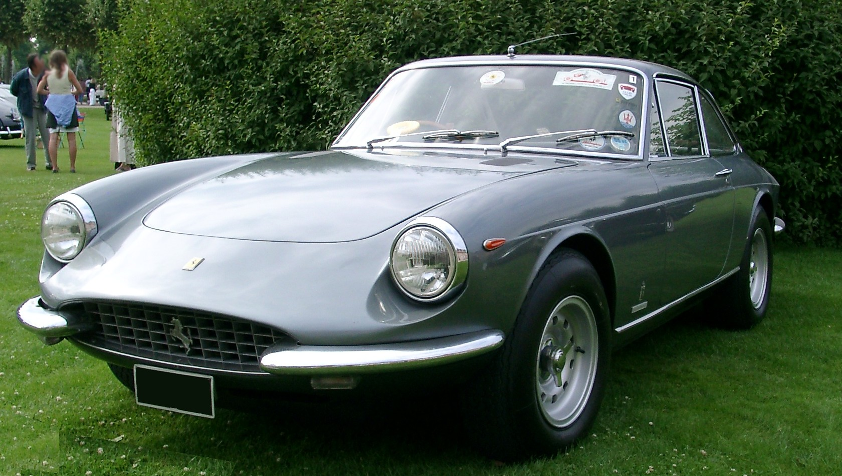 Ferrari 365 GTC Coupe, Baujahr 1963. Fotografiert anläßlich des European Concours d'Elegance 2002 in Schwetzingen